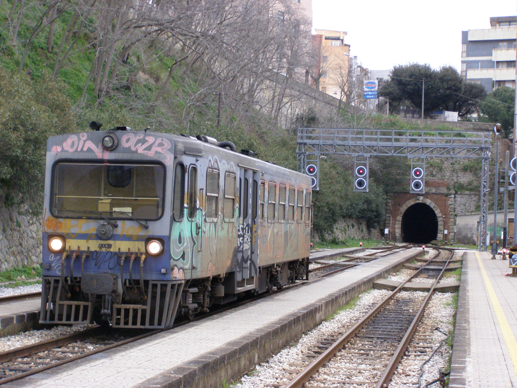 Automotrice M4 serie 400 pronta a partire alla volta di Gimigliano a Catanzaro Città